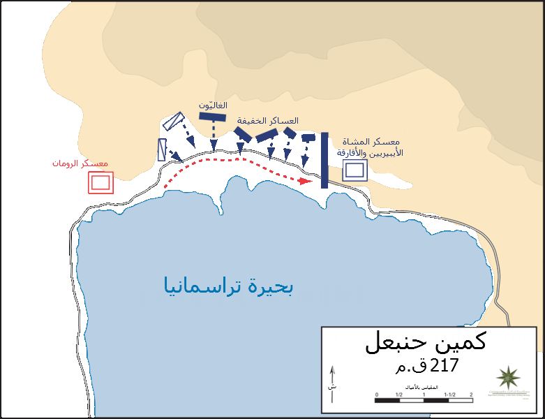 مُخطط معركة بحيرة تراسمانيا، كمين حنبعل الذي وقع فيه الرومان.